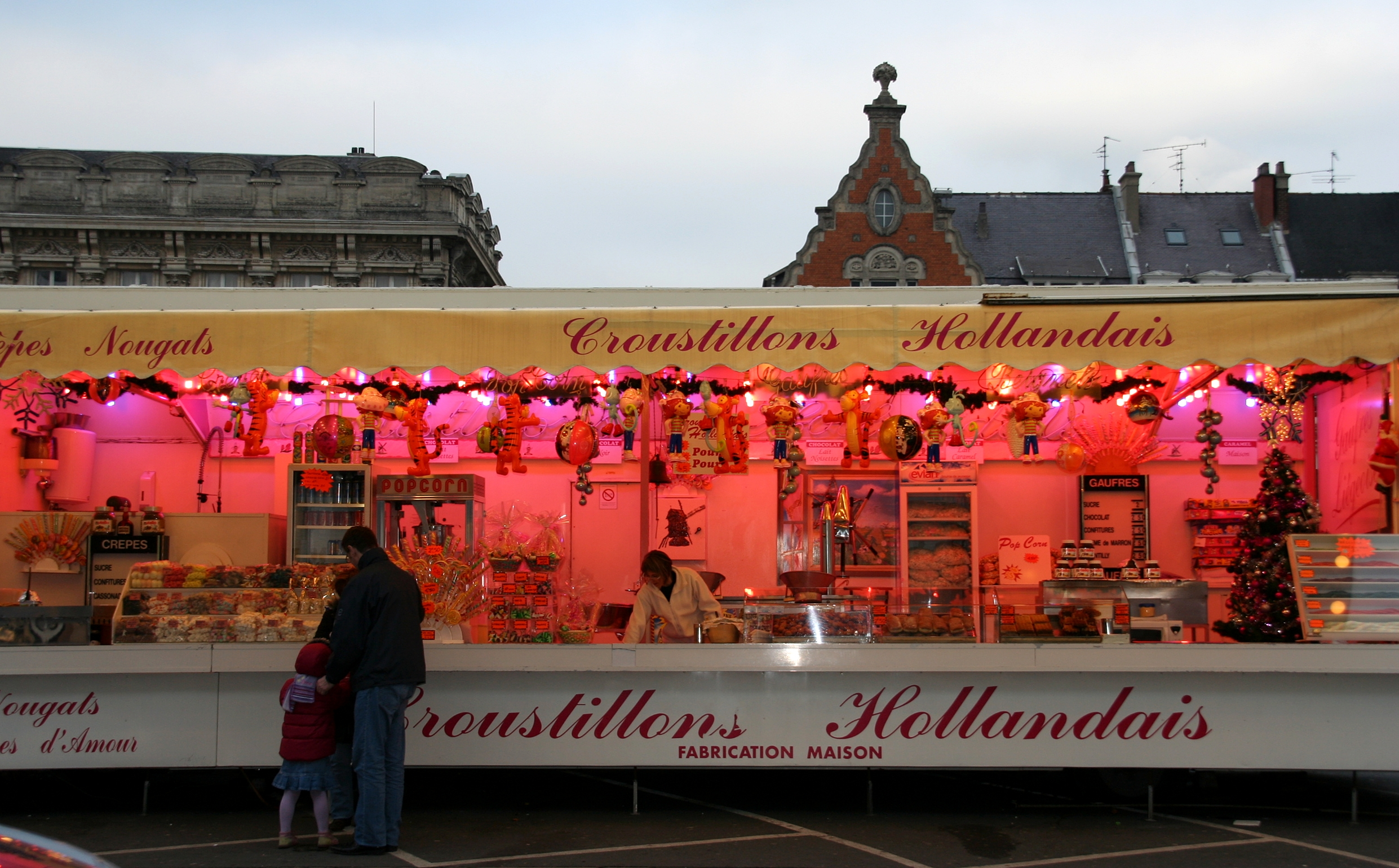 Roulotte de croustillons à Cambrai en décembre 2008